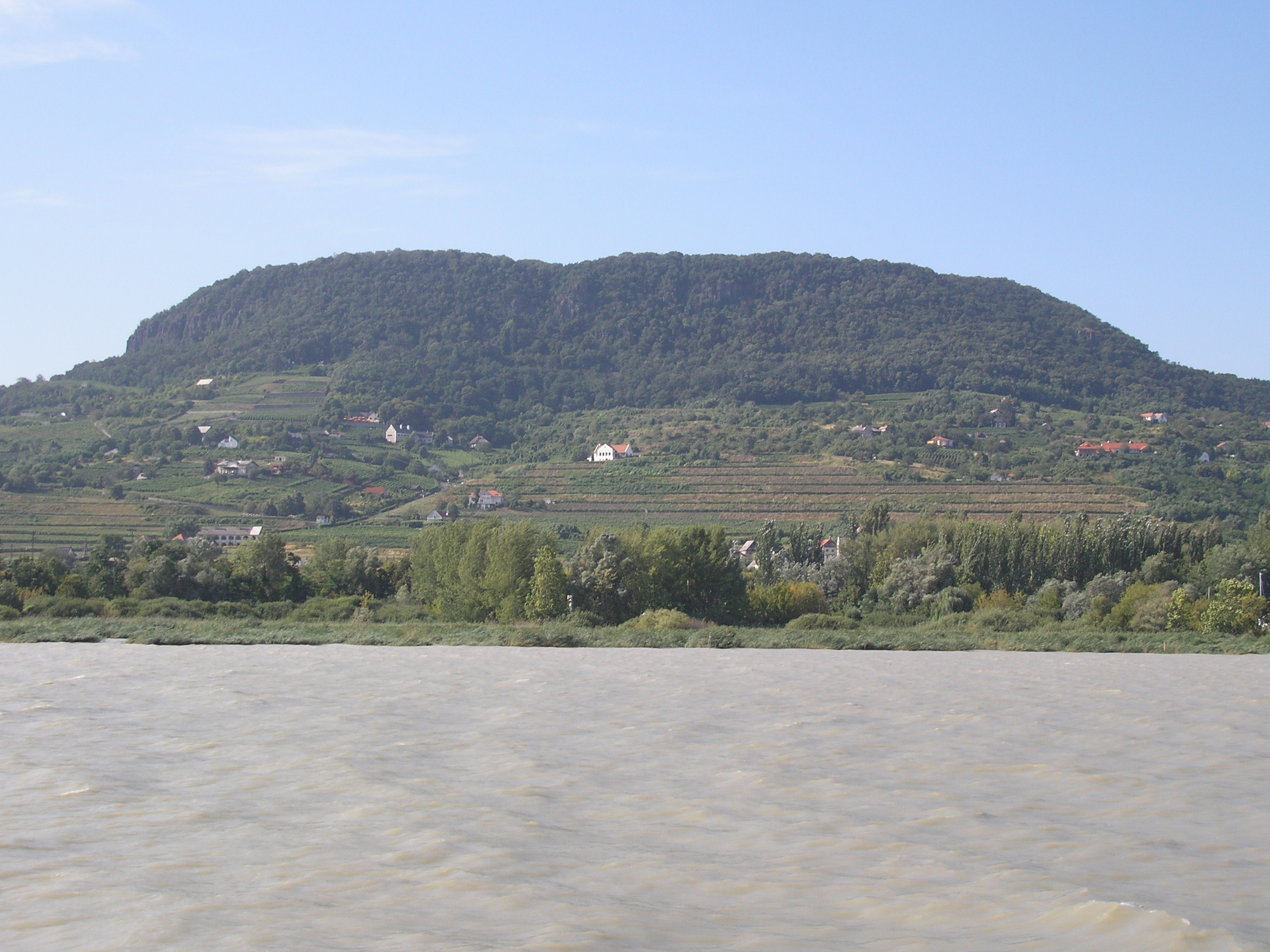 Unknown language: Badacsonytomaj látkép